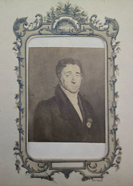 Ange Jean Michel Bonaventure marquis de Dax d'Axat (1767-1847), Maire de Montpellier